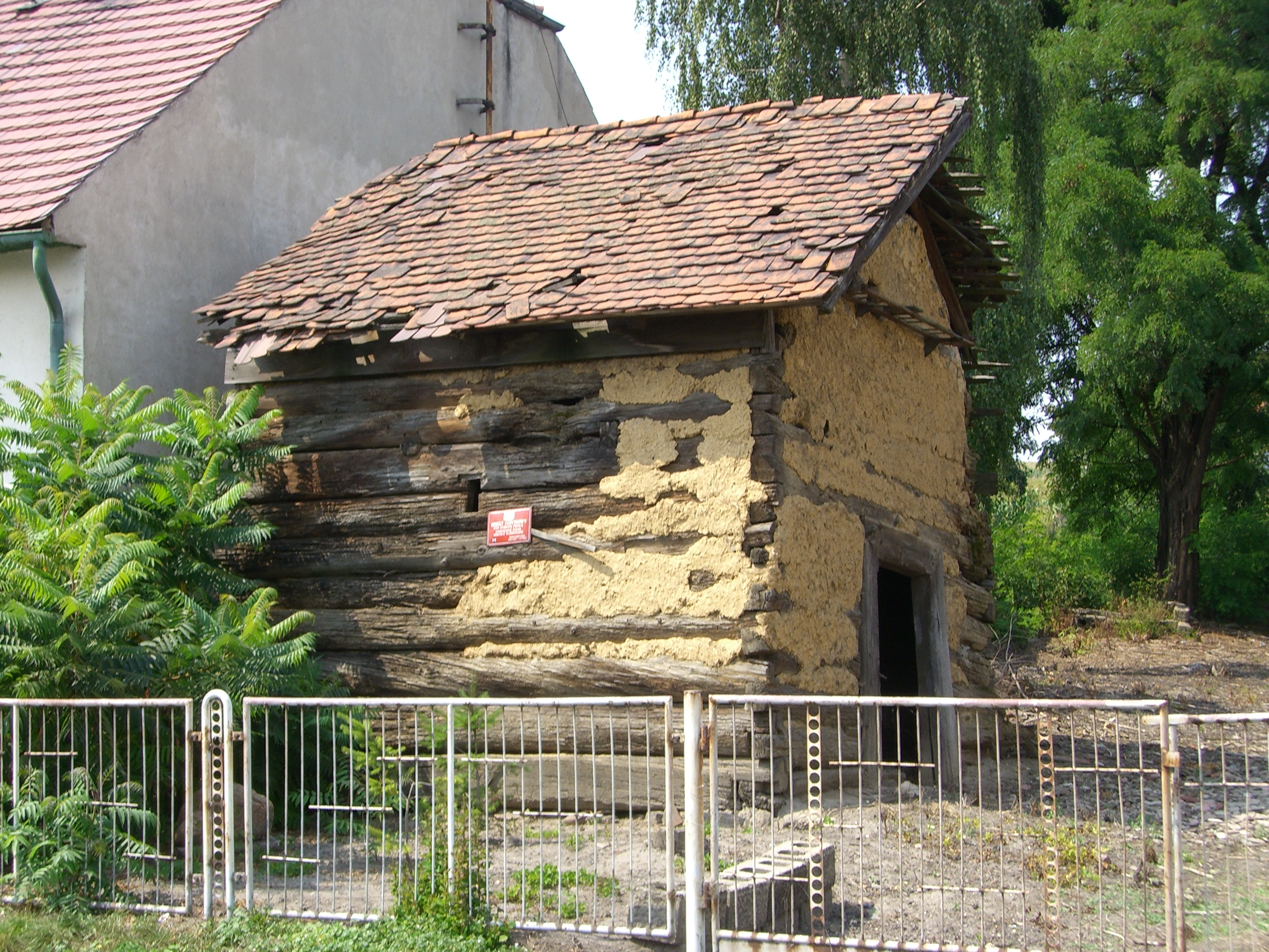 Ein alter hölzerner Speicher. Er steht an der Główna Straße